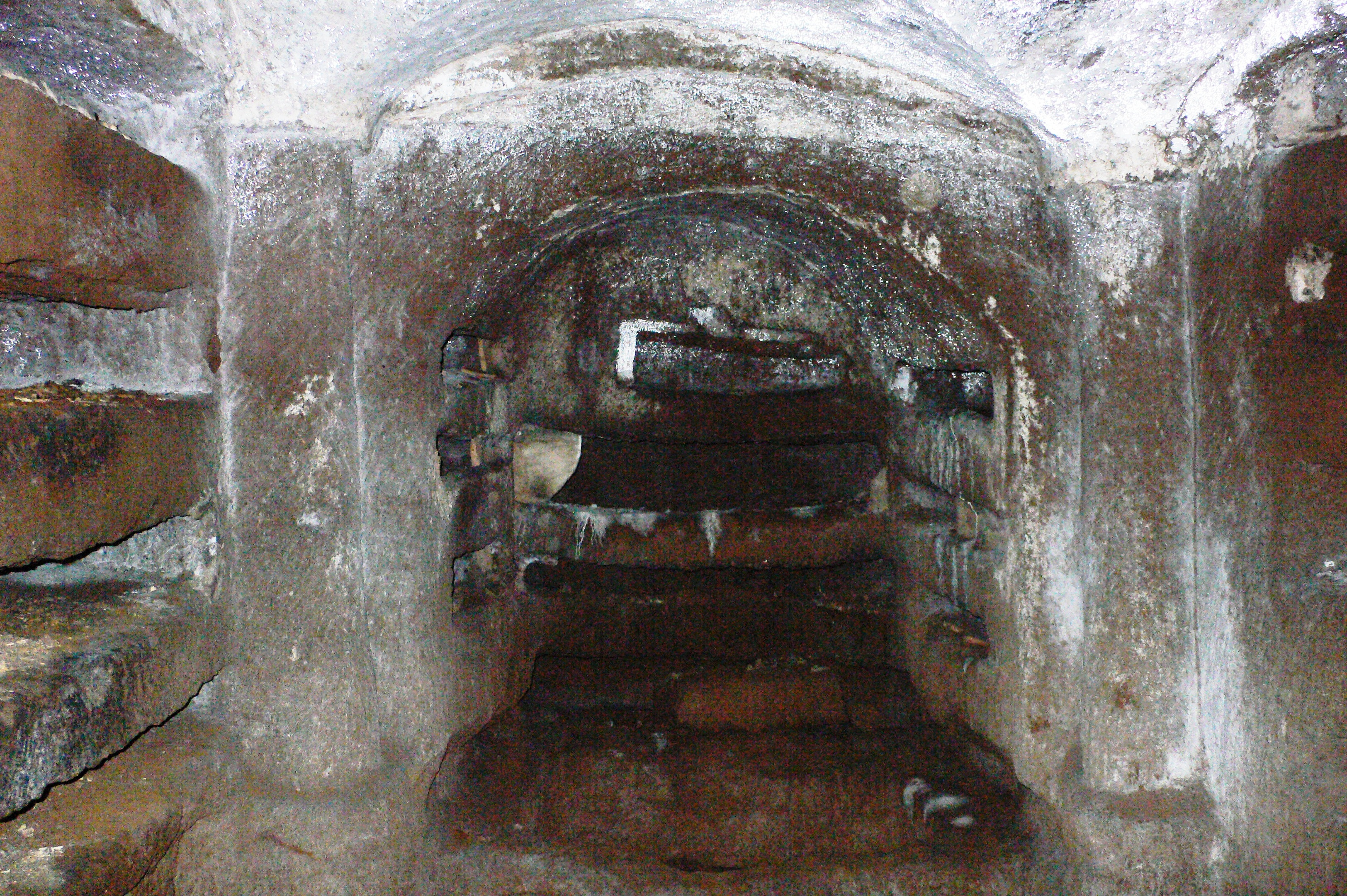 Gang in Tuffgestein